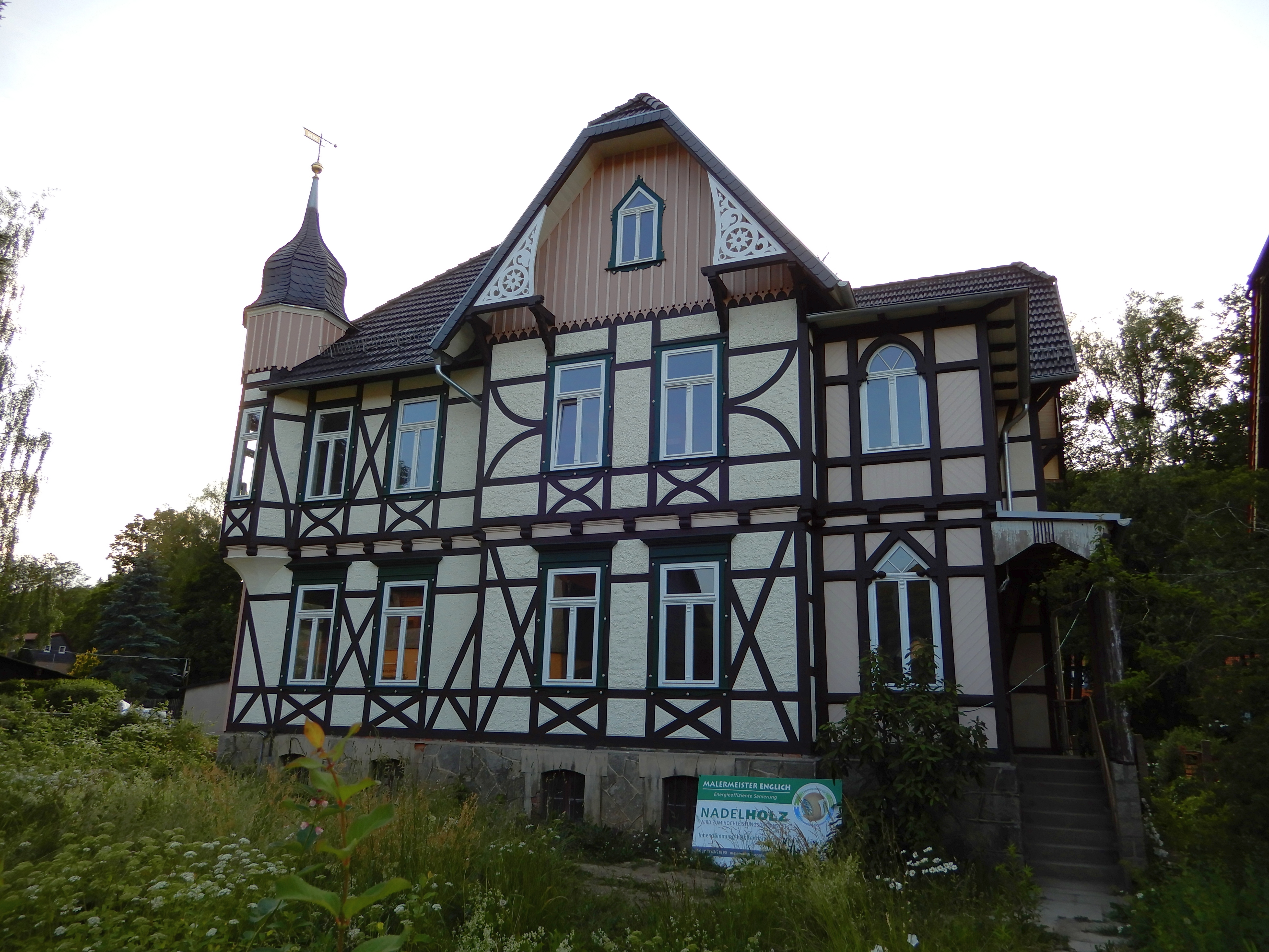 Wohnhaus in der Friedrichstraße in Hasserode